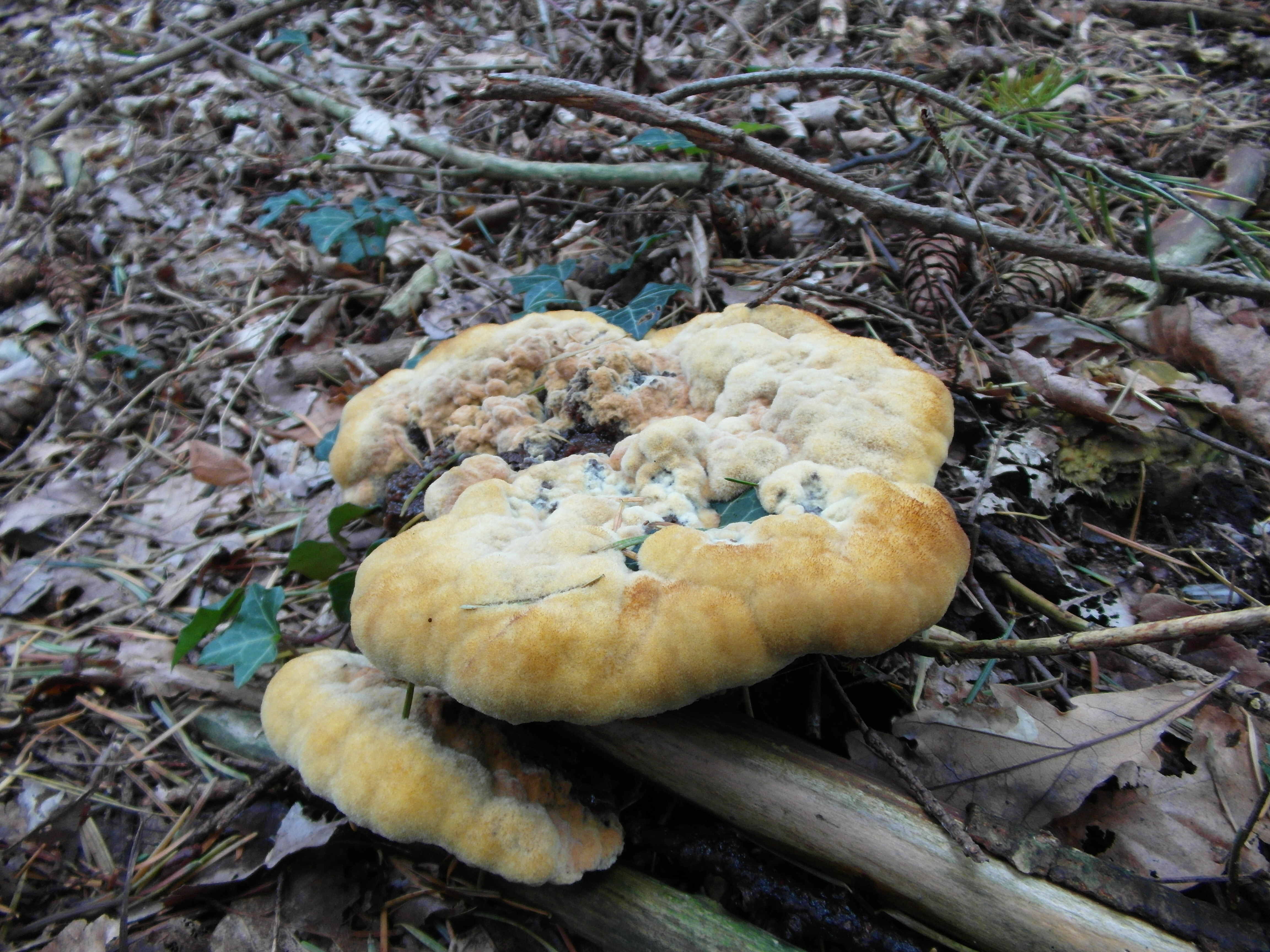 'n Vers sporokarp van Phaeolus schweinitzii in een Nederlandse naaldbos